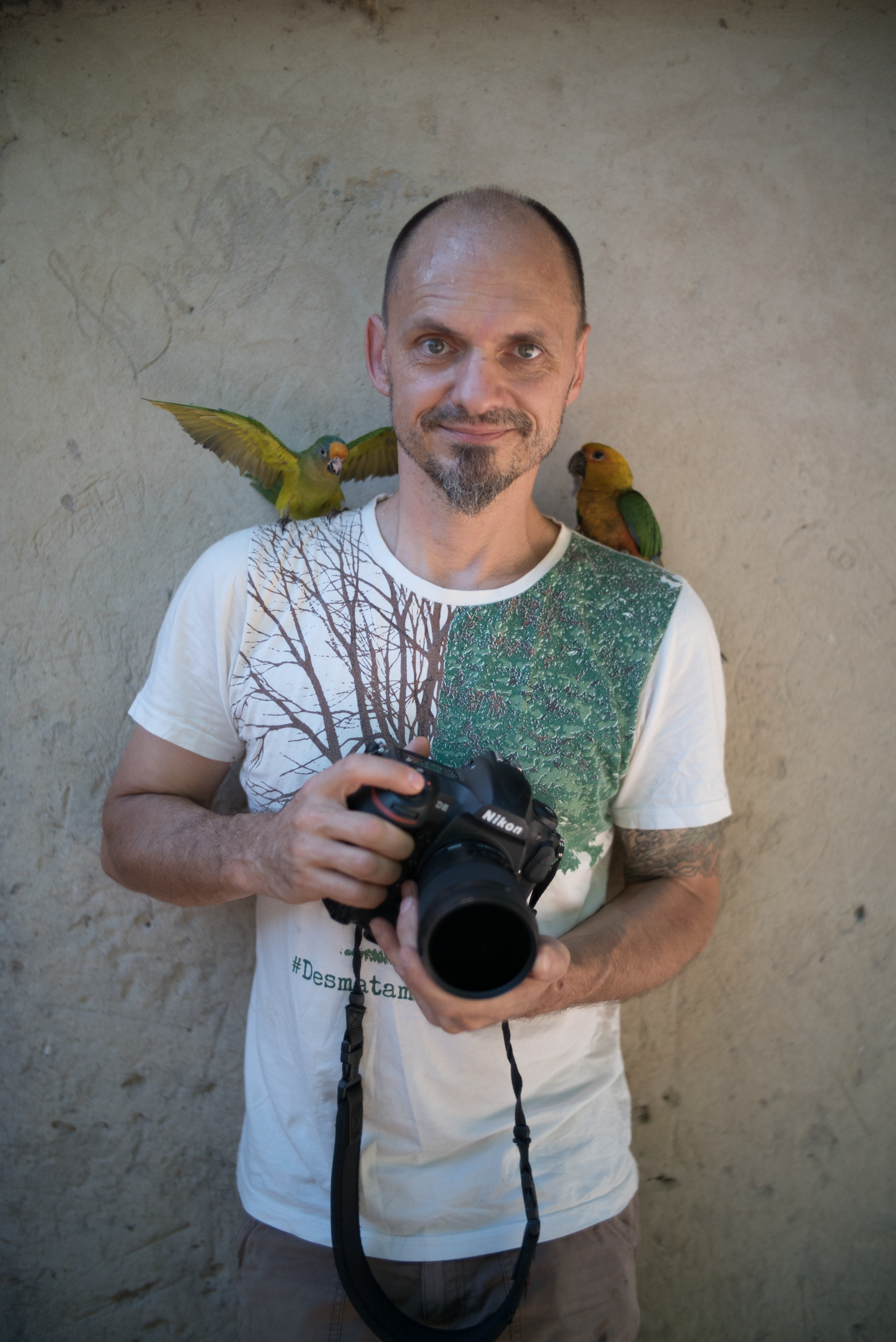 Der Fotograf Markus Mauthe in Brasilien.